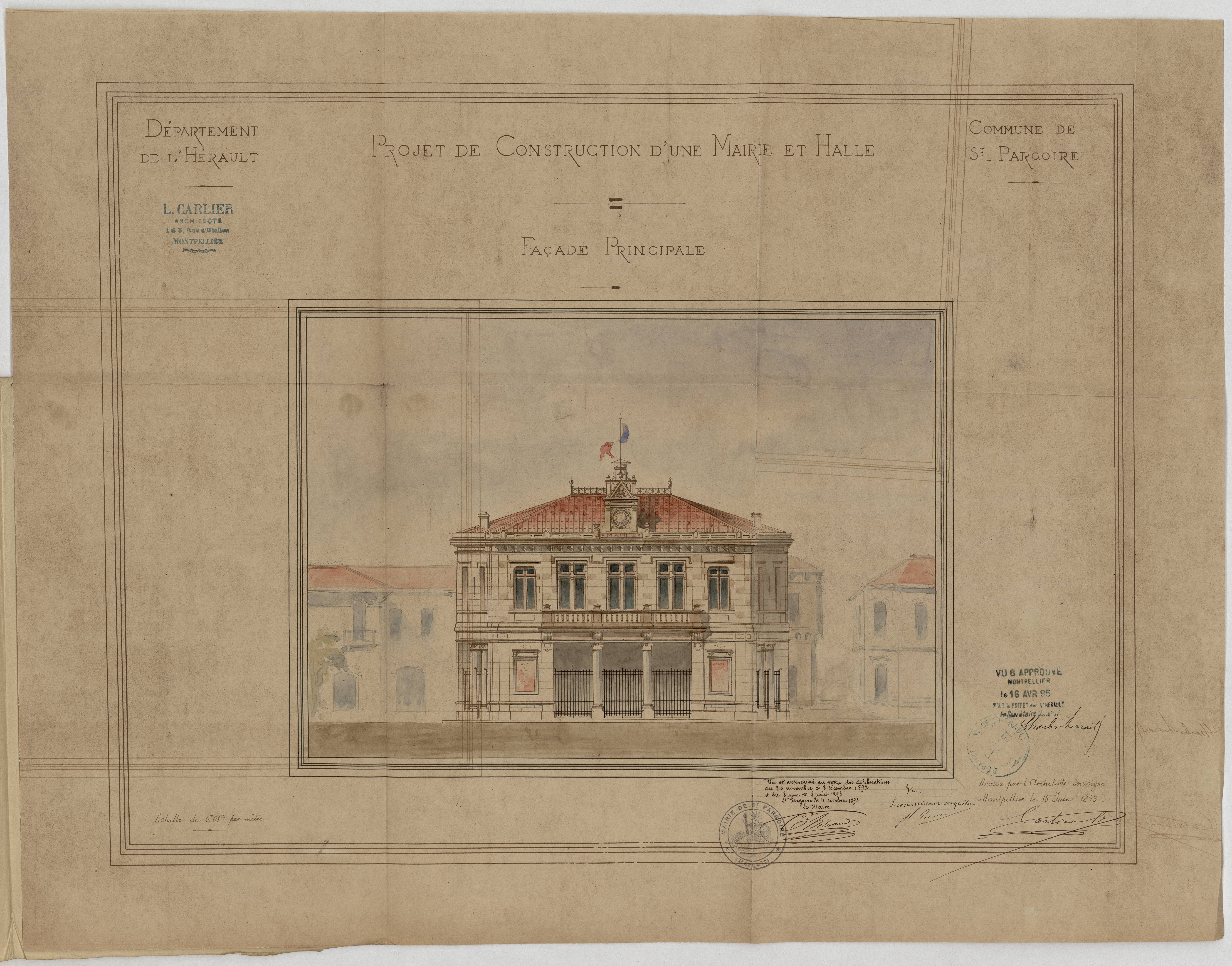 Saint-Pargoire. - Projet de construction d'une mairie et halle : façade principale